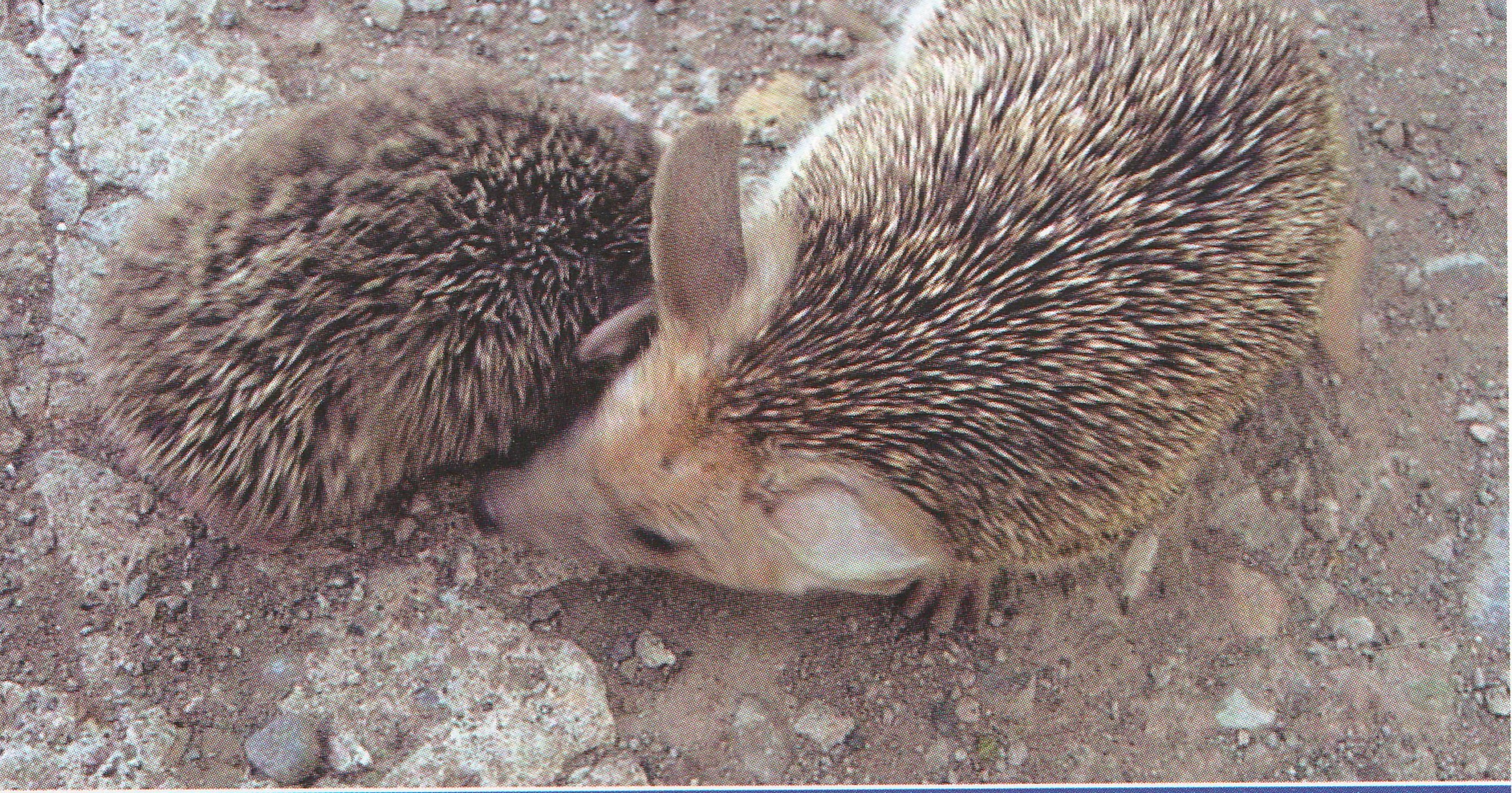 Kəngərli rayonu. Qulaqlı kirpi